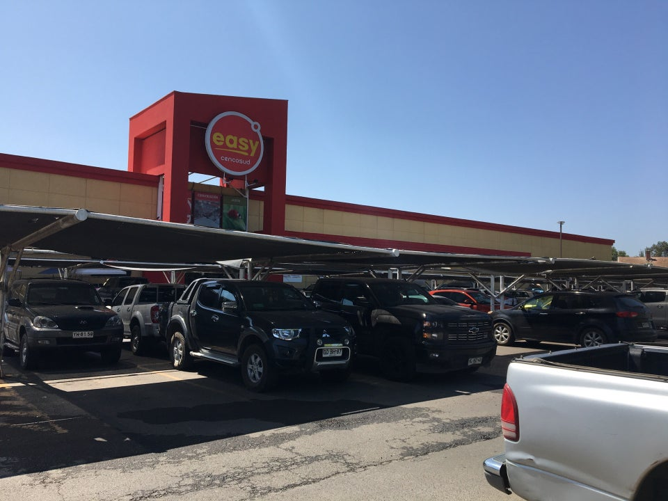 Easy de Talca